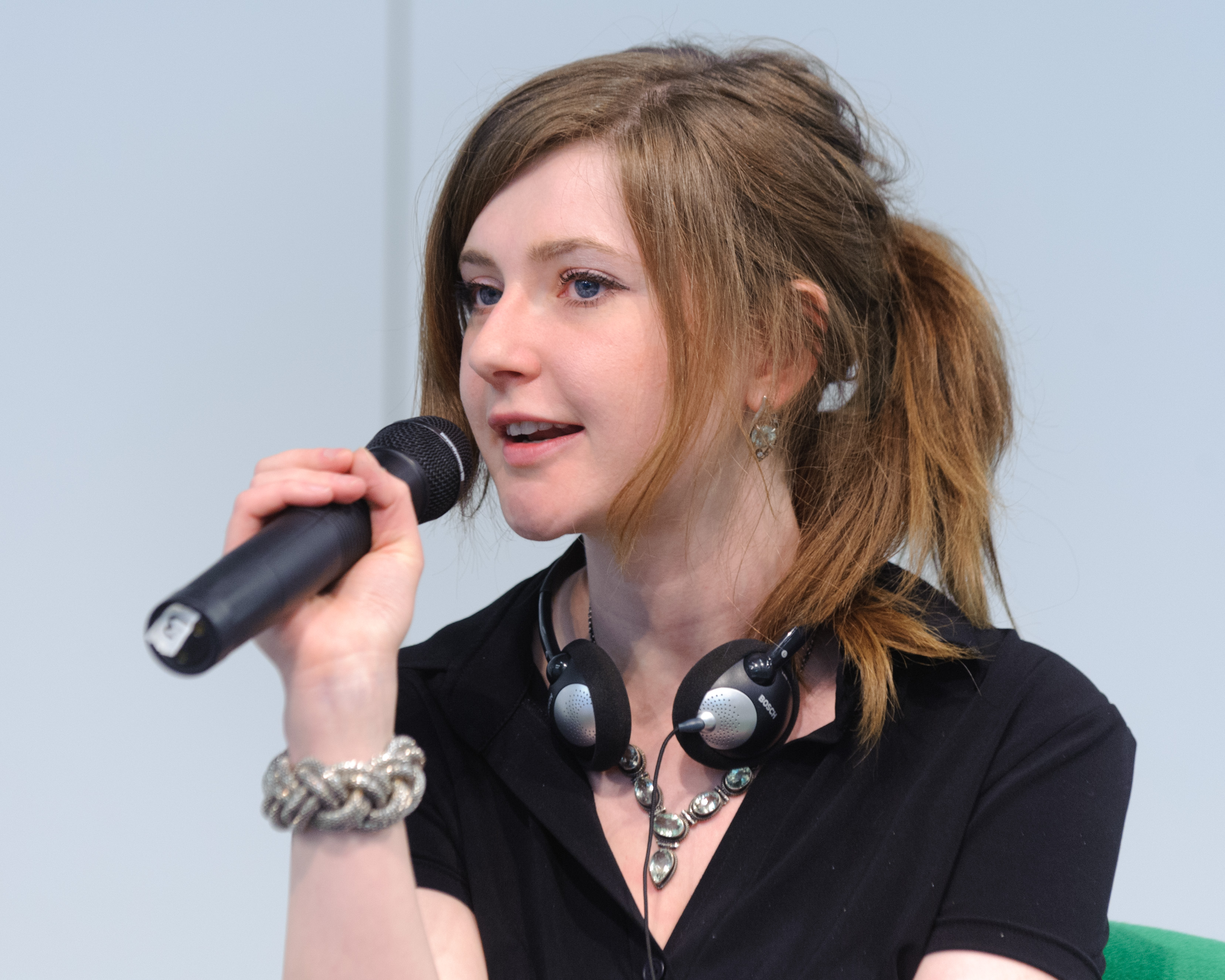 Olga Grjasnowa (Schriftstellerin, Deutschland) Foto: Stephan Röhl